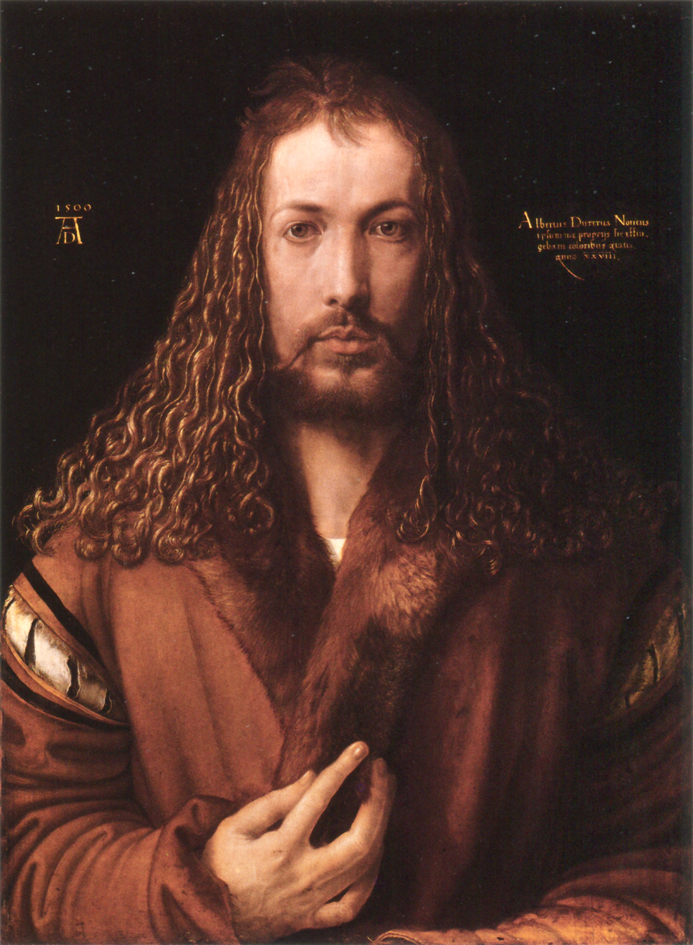 Frontalporträt mit Idealisierung vergleichbar mit Christusdarstellungen; betonter Blick und die schöpferische Hand als Werkzeuge des Künstlers